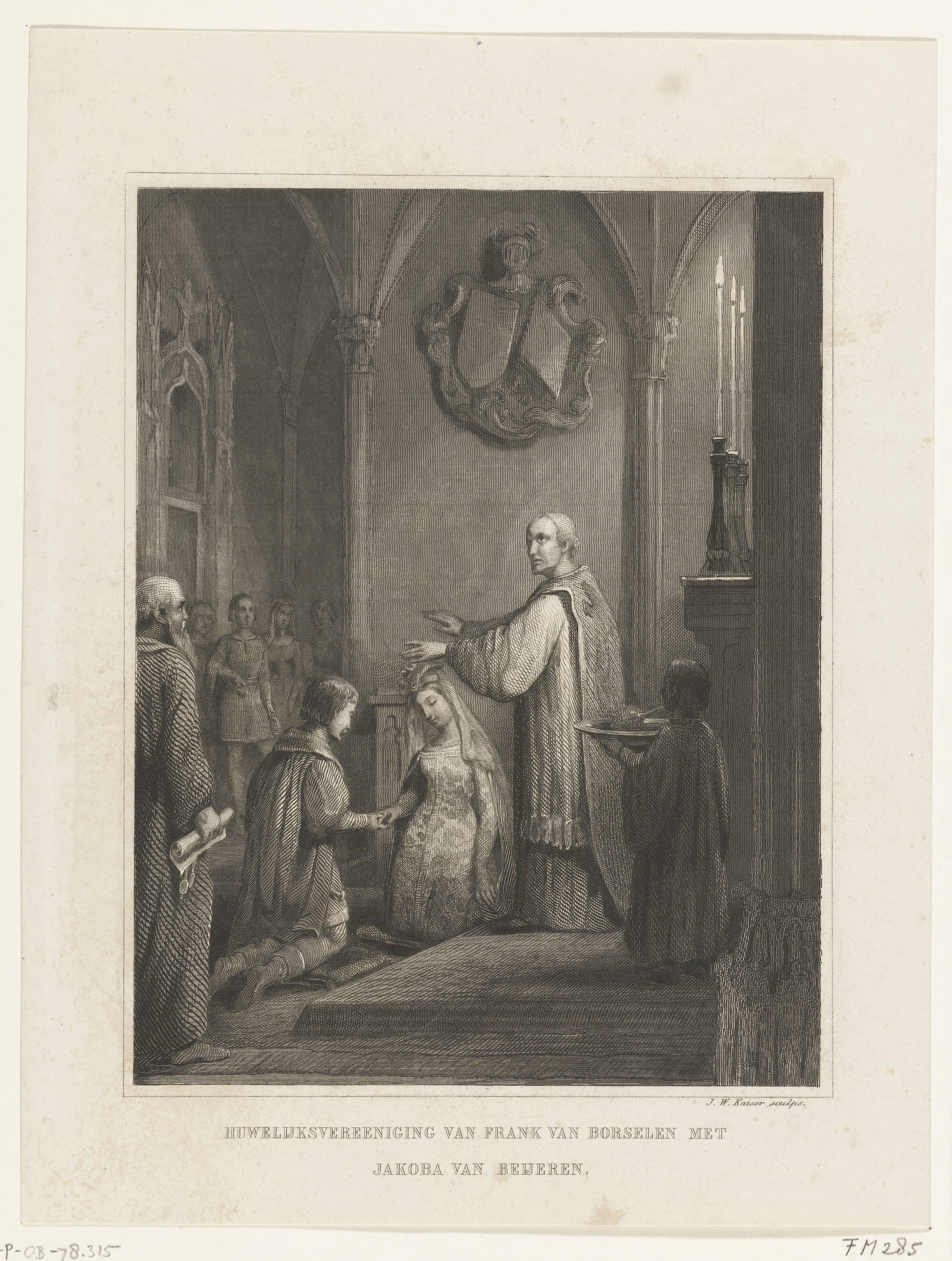 IdentificatieTitel(s): Huwelijk van Jacoba van Beieren en Frank van Borselen, 1434Huwelijksvereeniging van Frank van Borselen met Jakoba van Beijeren (titel op object)Objecttype: prent historieprent Objectnummer: RP-P-OB-78.315Catalogusreferentie: FMH 285Atlas van Stolk 19Atlas van Stolk 181Omschrijving: Huwelijk van Jacoba van Beieren en Frank van Borselen, 1 augustus 1434. In een kerkinterieur zegent een priester het knielende paar.VervaardigingVervaardiger: prentmaker: Johann Wilhelm Kaiser (I) (vermeld op object)Plaats vervaardiging: NederlandDatering: 1842 - 1844Fysieke kenmerken: staalgravureMateriaal: papier Techniek: staalgravureAfmetingen: papier: h 237 mm × b 182 mmToelichtingIllustratie voor: J.P. Arend, Algemeene geschiedenis des vaderlands, Amsterdam, 5 delen, 1840-1882, dl. 2.2, p. 522.OnderwerpWat: (civil) marriage ceremoniesBourgondische tijd in NederlandWanneer: 1434-08-01 - 1434-08-01Waar: NederlandWie: Jacoba van Beieren (gravin van Holland, Zeeland en Henegouwen)Frank van BorselenVerwerving en rechtenVerwerving: aankoop 1881Copyright: Publiek domein